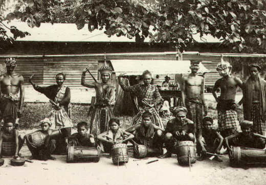 ภาพเก่า ผู้แสดงละครโนรา